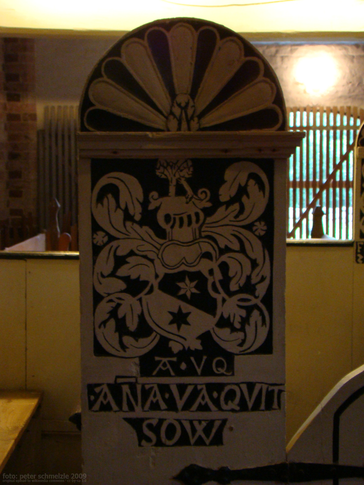 Wappen des Ficke von Bassewitz am Patronatsgestühl (16. Jhd.) der Dorfkirche in Basse